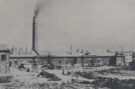 Казанский стеариновый завод Фабрично-торгового товарищества братьев Крестовниковых в первый год существования.